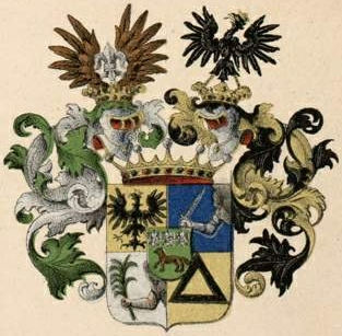 Wolffi suguvõsa vabahärravapp